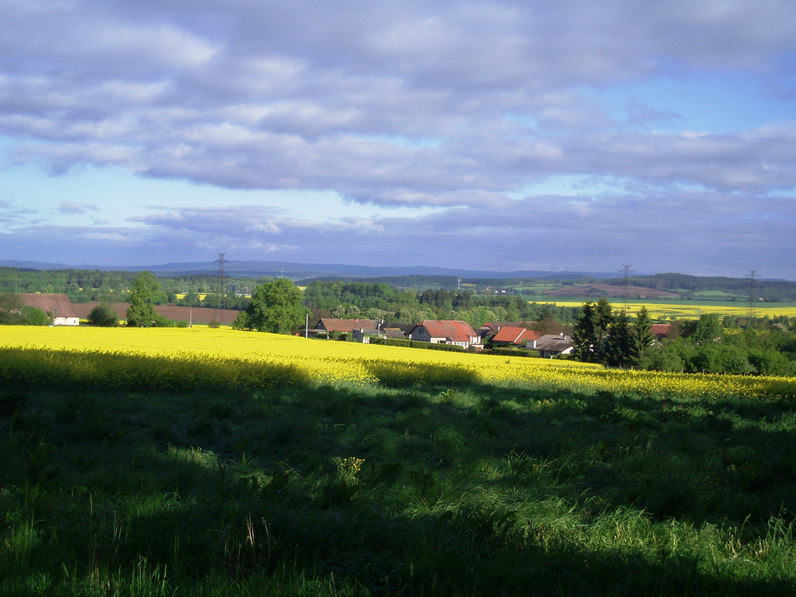 Zbenice - pohled na vesnici